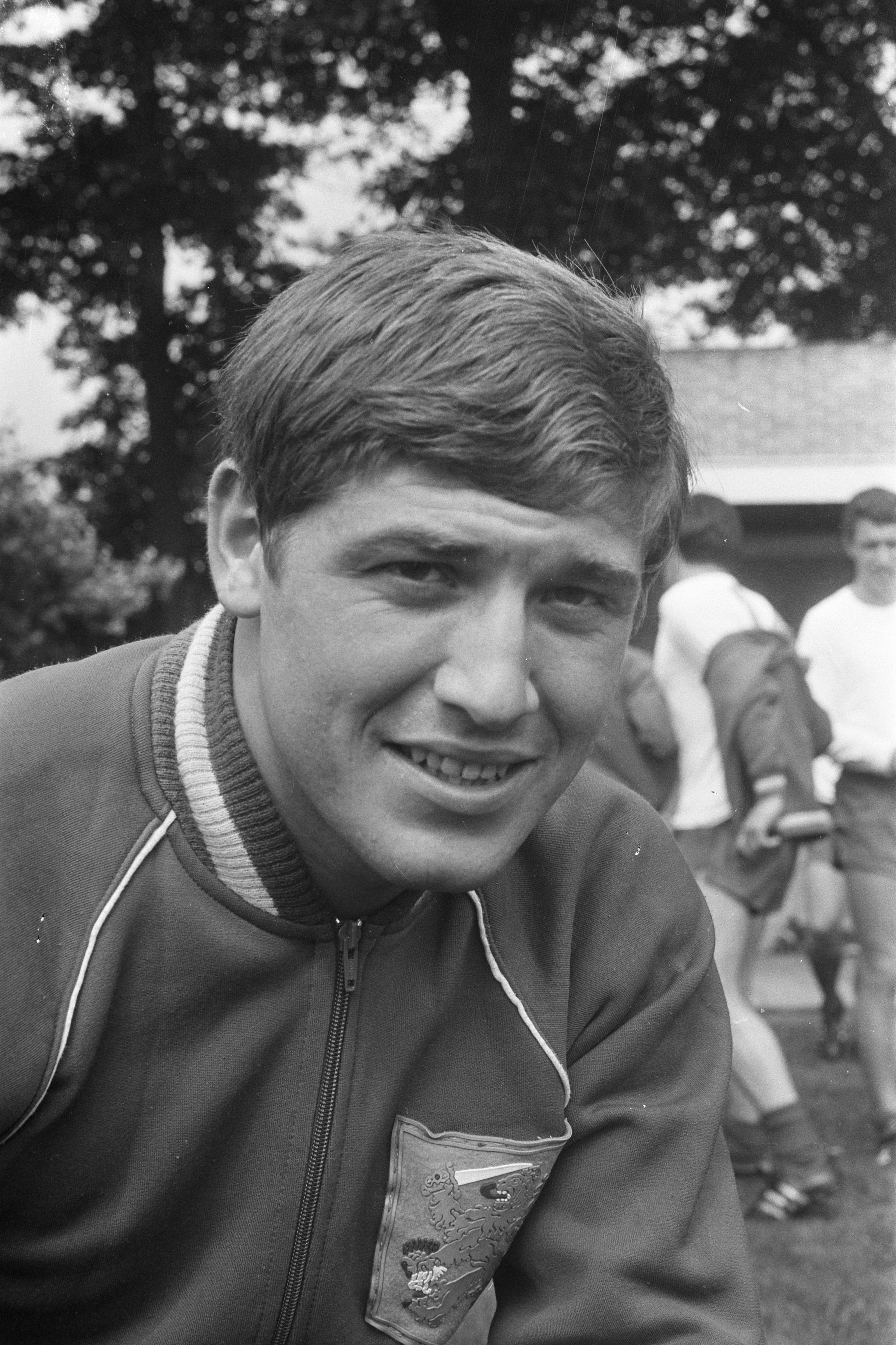 Collectie / Archief : Fotocollectie Anefo Reportage / Serie : Voetballers Nederlands elftal Beschrijving : Theo van Duivenbode Annotatie : Randnummers negatiefstrook nr. 2 - Theo van Duivenbode; nr. 3 Hans Bentzon; nr. 4 - Jan van Gorp Datum : 11 augustus 1968 Trefwoorden : portretten, voetballers Persoonsnaam : Duivenbode, Theo van Fotograaf : Fotograaf Onbekend / Anefo Auteursrechthebbende : Nationaal Archief Materiaalsoort : Negatief (zwart/wit) Nummer archiefinventaris : bekijk toegang 2.24.01.05 Bestanddeelnummer : 921-5887